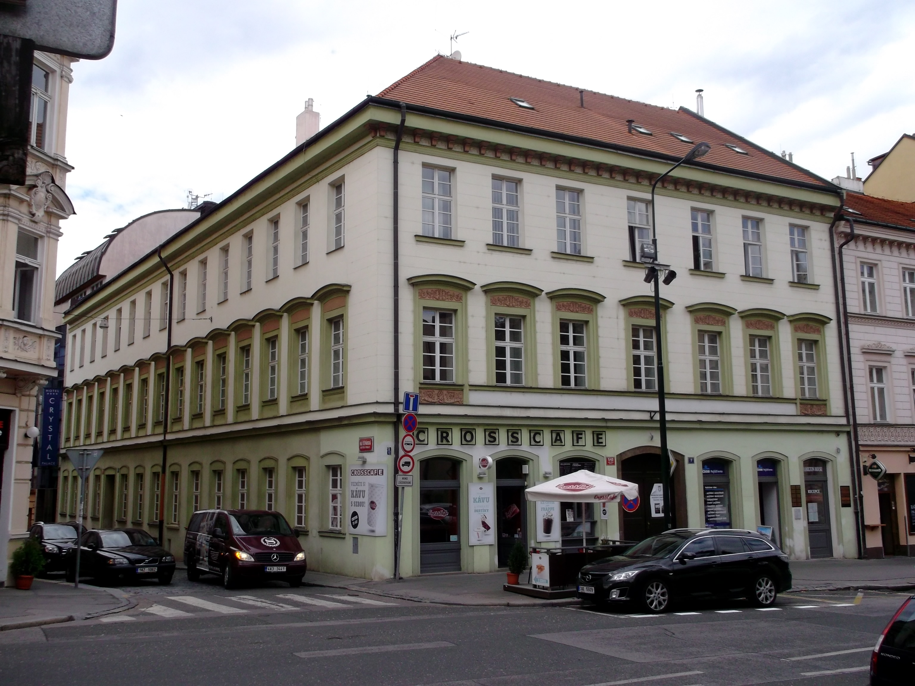 Měšťanský dům (Nové Město), Praha 2-Nové Město, Malá Štěpánská 540/19, Štěpánská 540/7